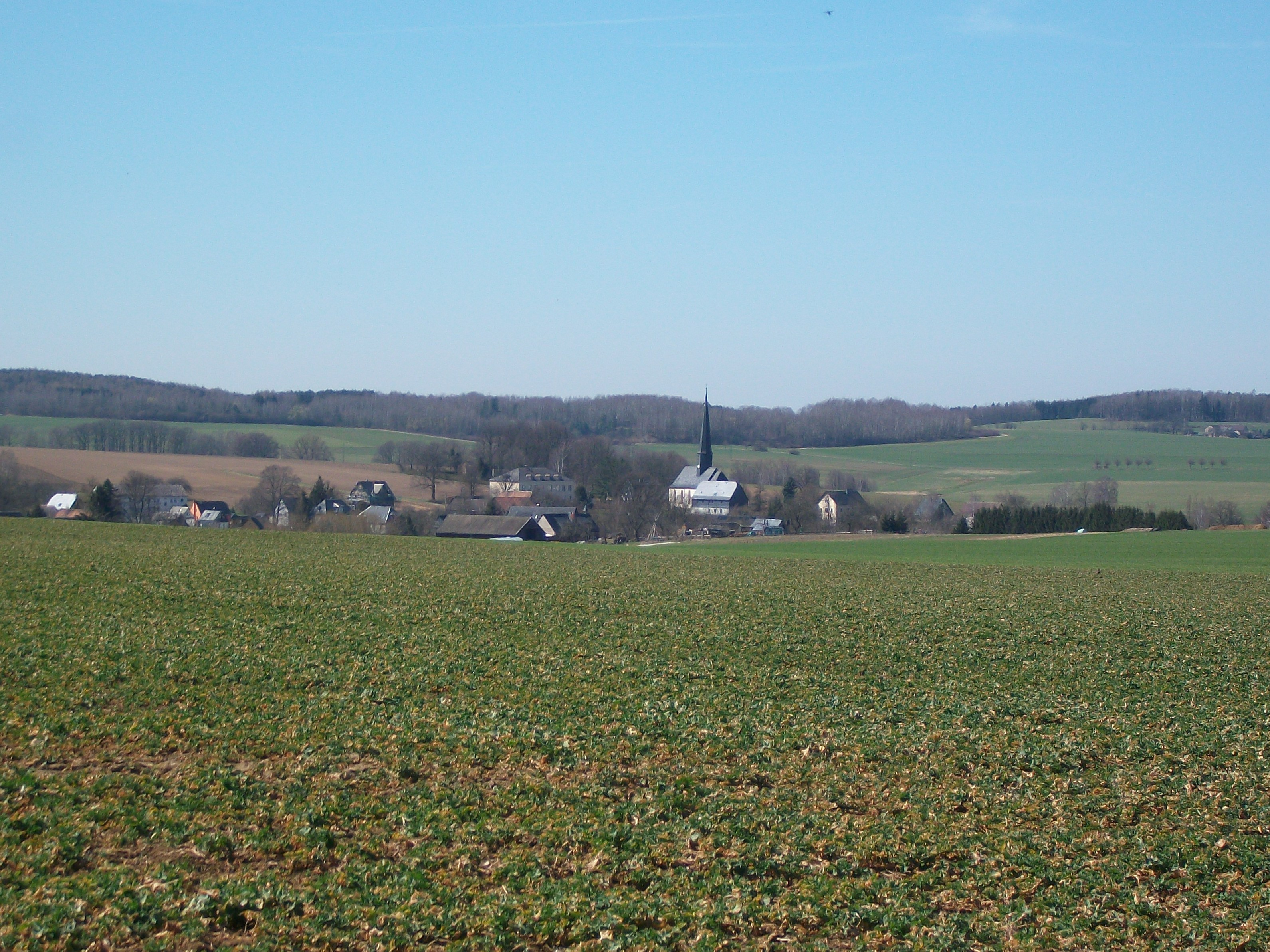 Aussicht auf Langenchursdorf